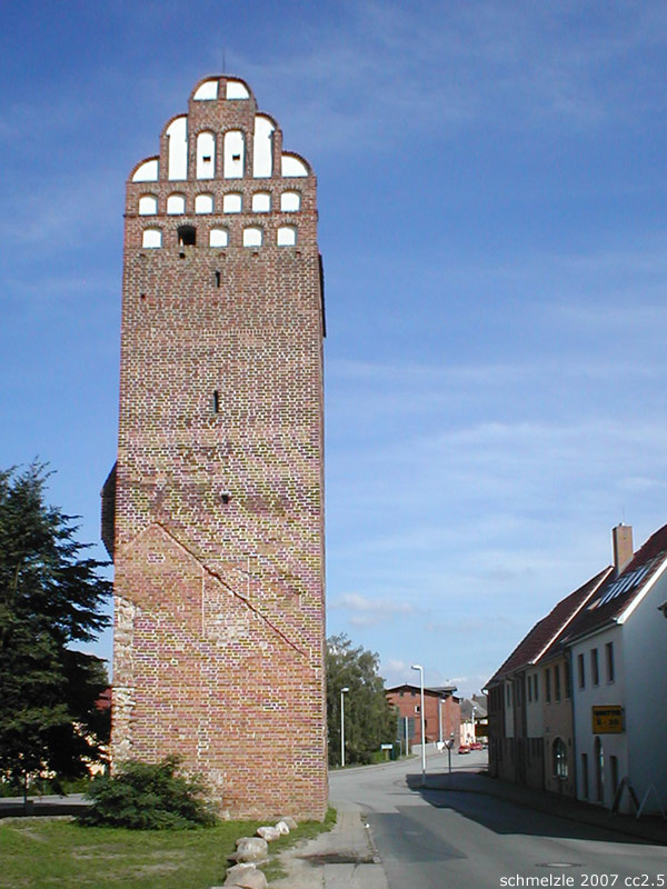 Fangelturm in Malchin, Mecklenburg-Vorpommern, Deutschland